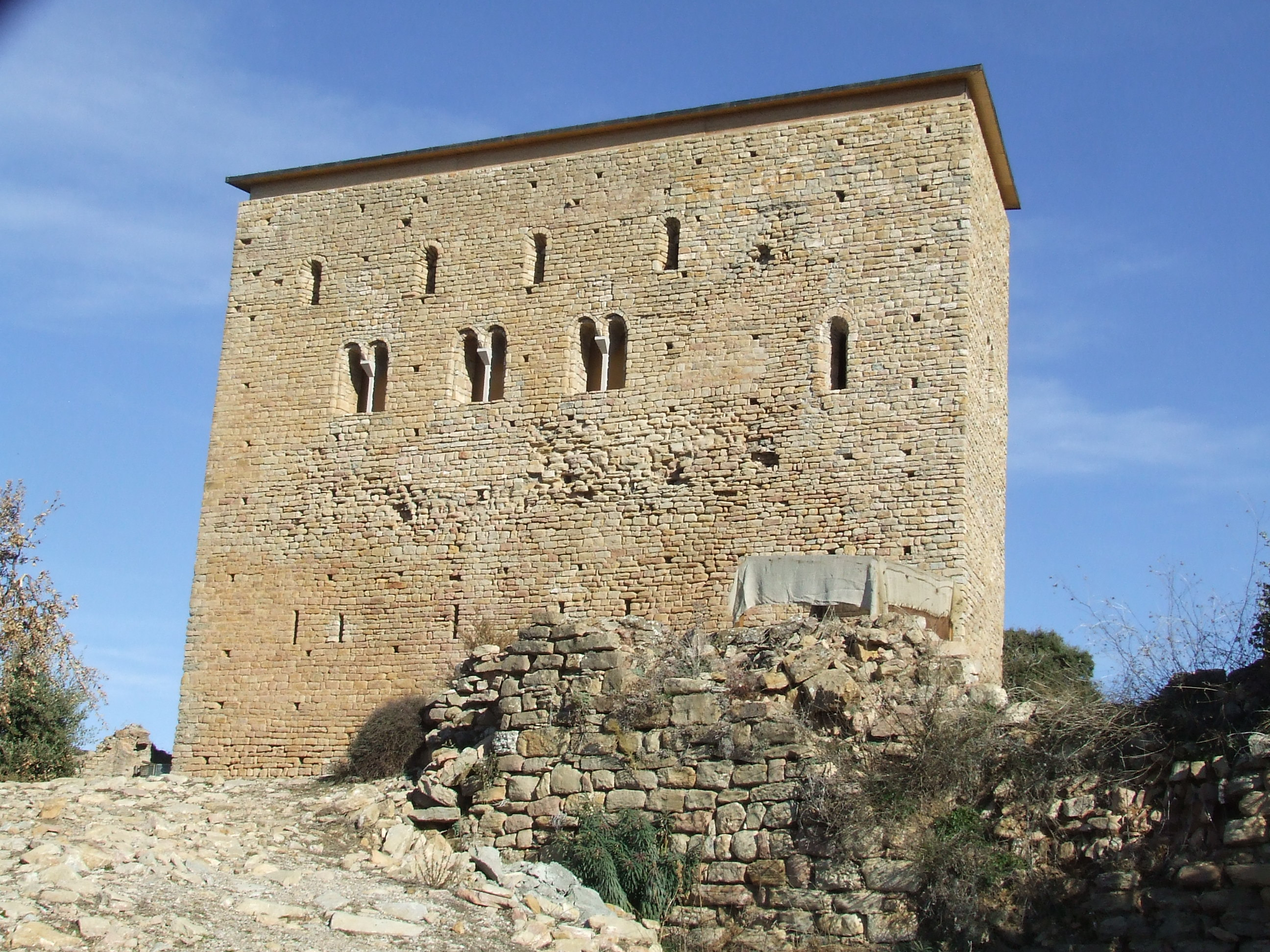 El Castell de Llordà. El cos principal (Llordà, Isona i Conca Dellà, Pallars Jussà)